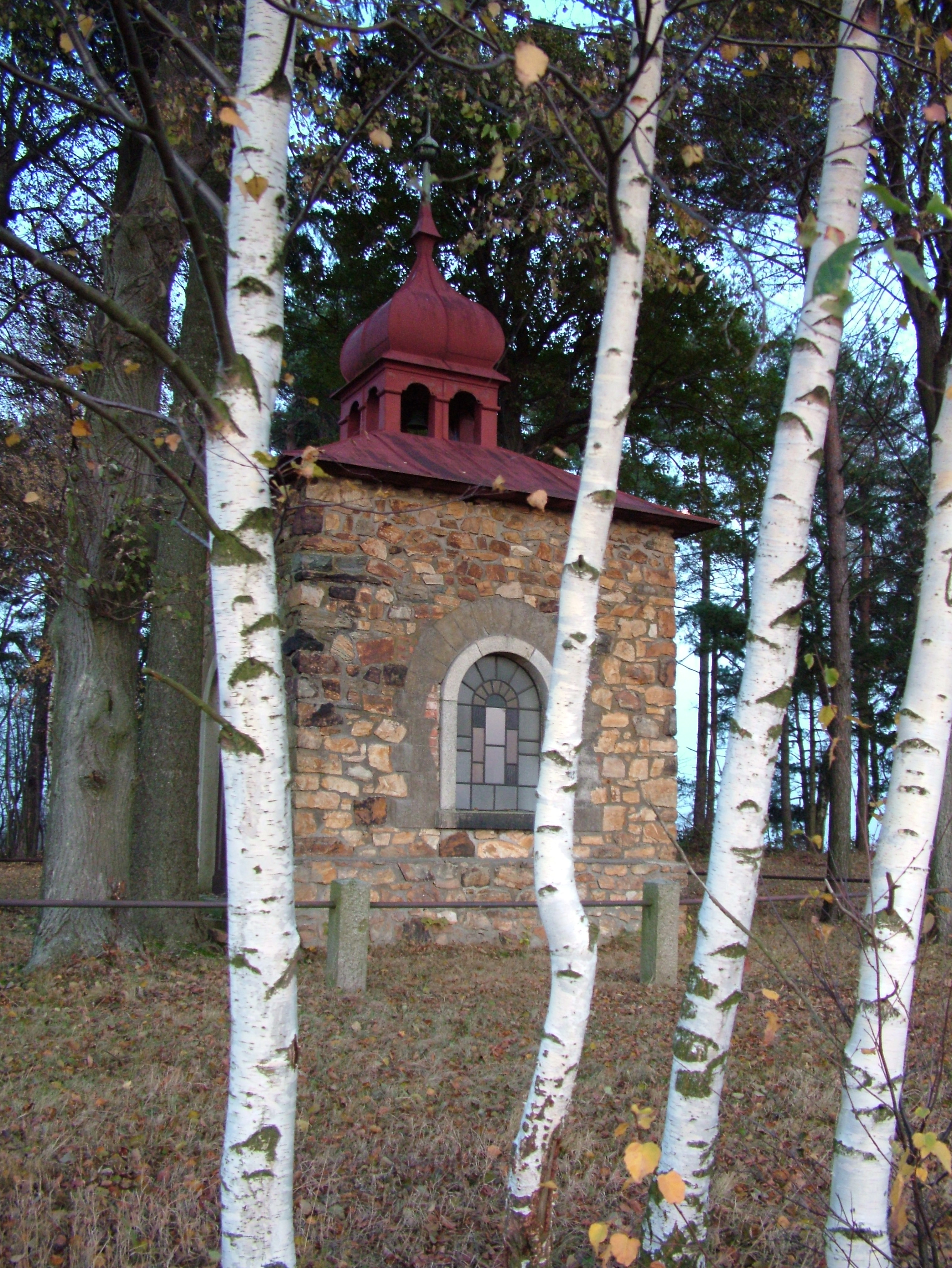 Kaple sv. Václava v Nadějově